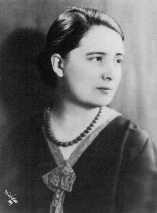 Rosita Renard Artigas (1894-1949), afamada pianista chilena